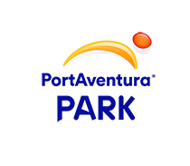 Logo